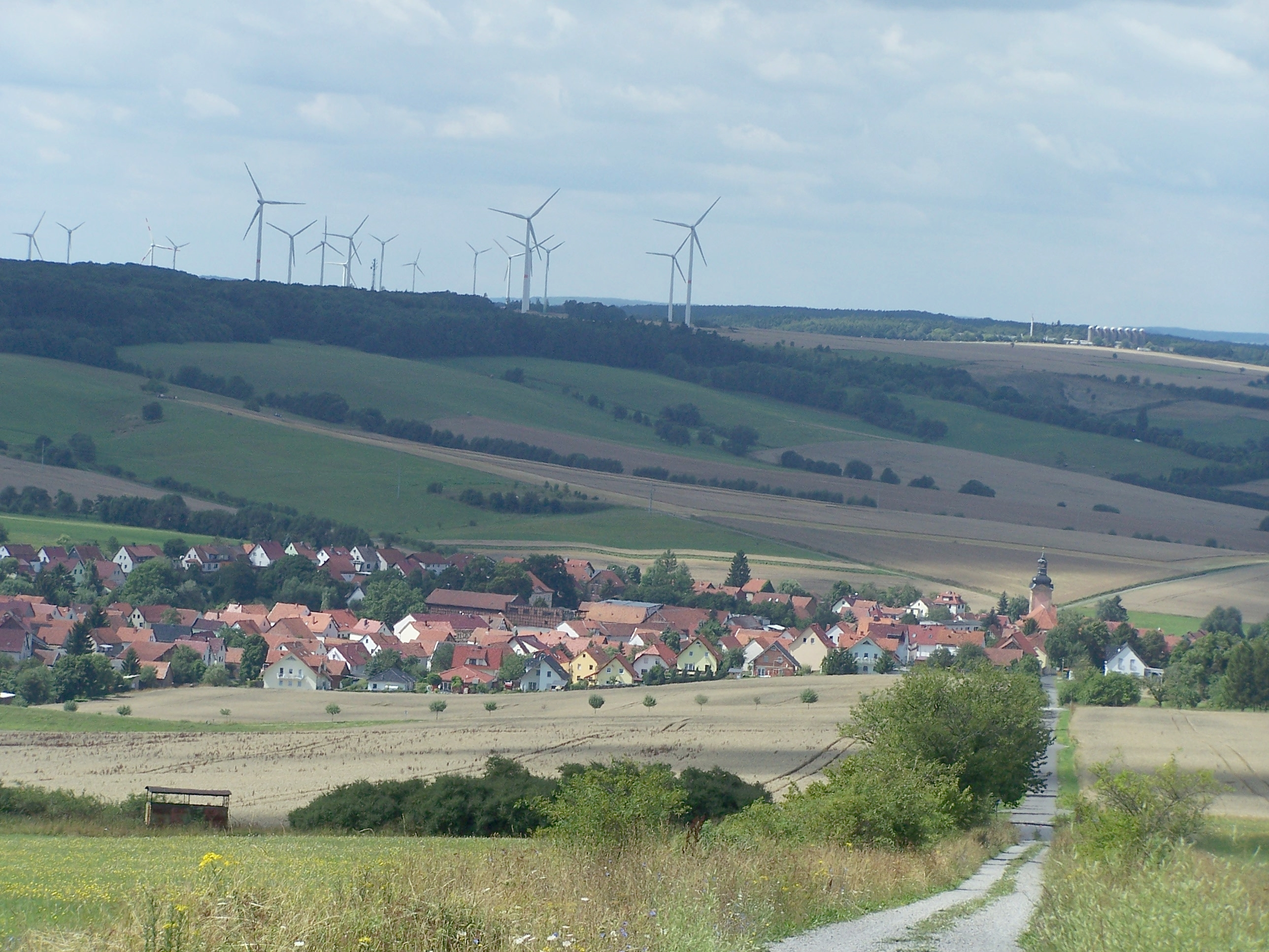 Ansicht des Ortes Berka vor dem Hainich von Osten, Im Hintergrund die Windkraftanlagen am Reitenberg bei Eisenach, OT Neukirchen.